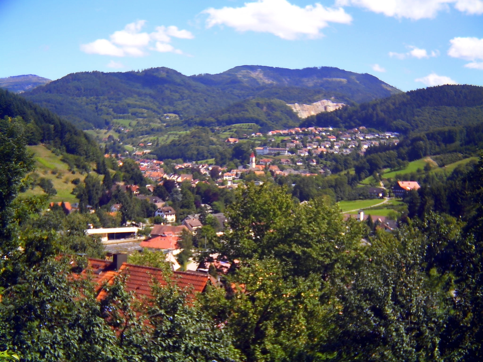 Ottenhöfen, Totalansicht, vom Mühlenweg aus gesehen.